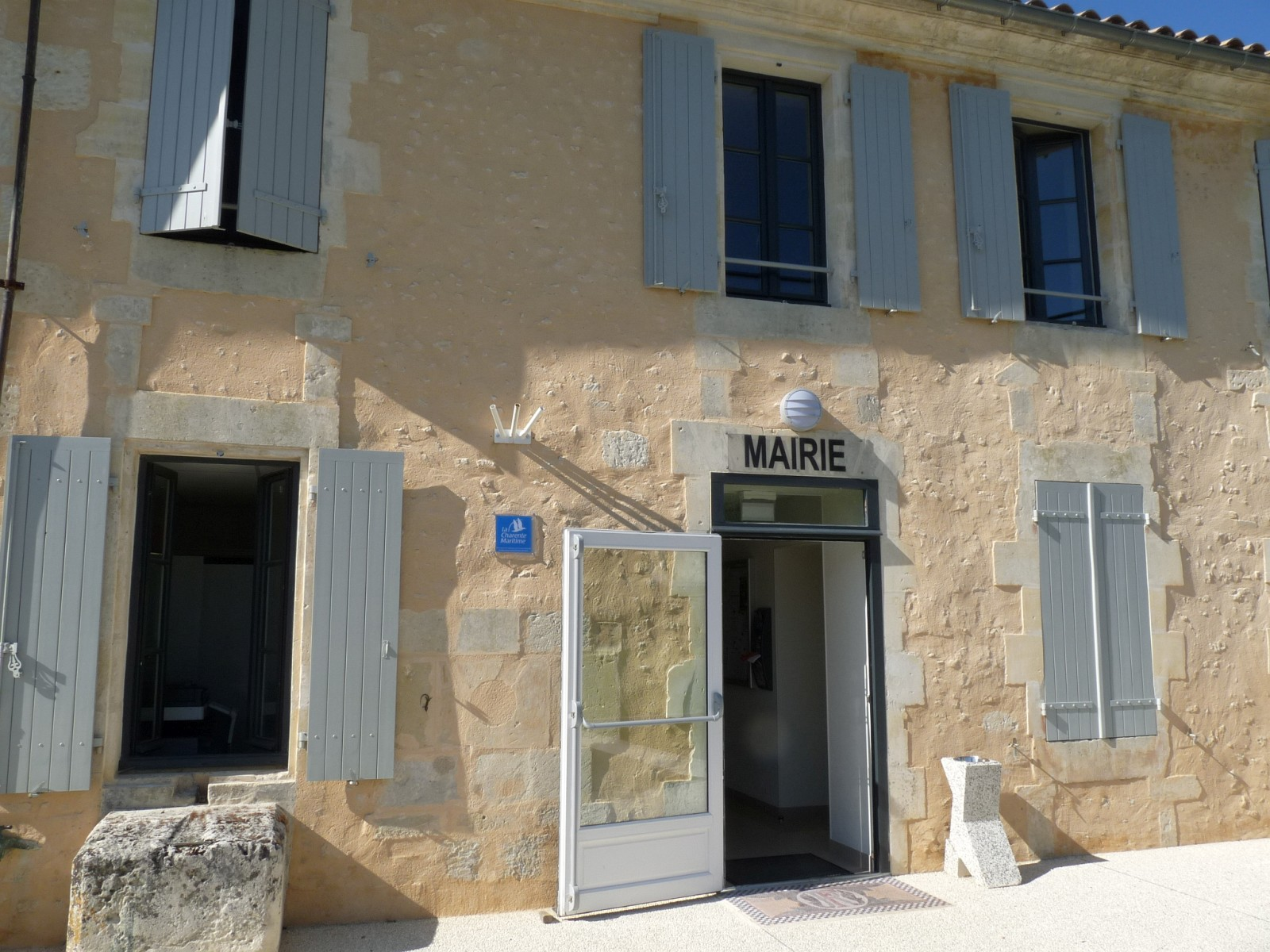 Mairie de Rouffignac, Charente-Maritime, France